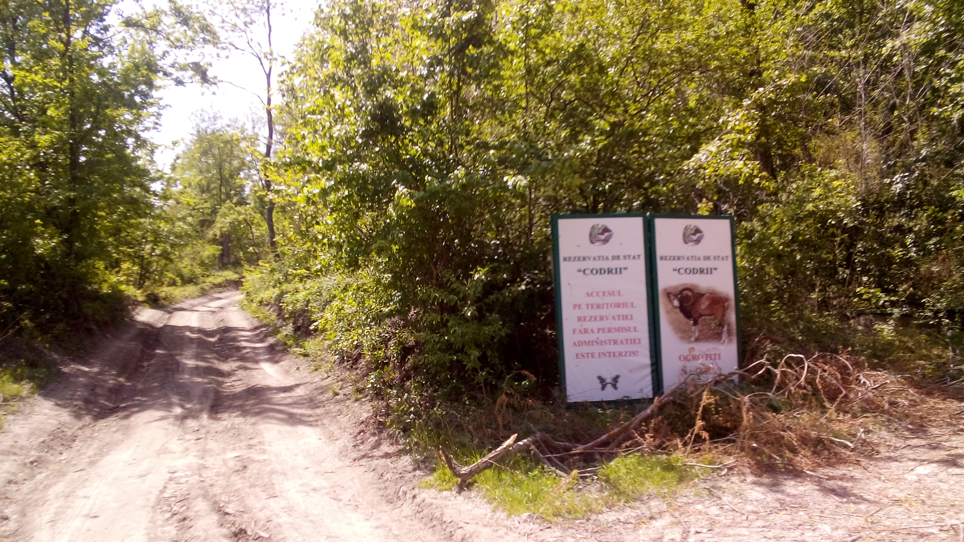 Codru, monument al naturii amplasat în raionul Strășeni, satul Lozova (cod MD-ST-rs-001)